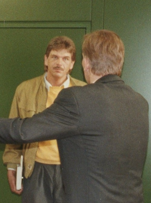 Vor dem Landesarbeitsgericht Dortmund kämpft Personalratsvorsitzender der Pro J. Siewert, der den Pensionskassen-Skandal dort aufgeklärt hat, um seinen Job.